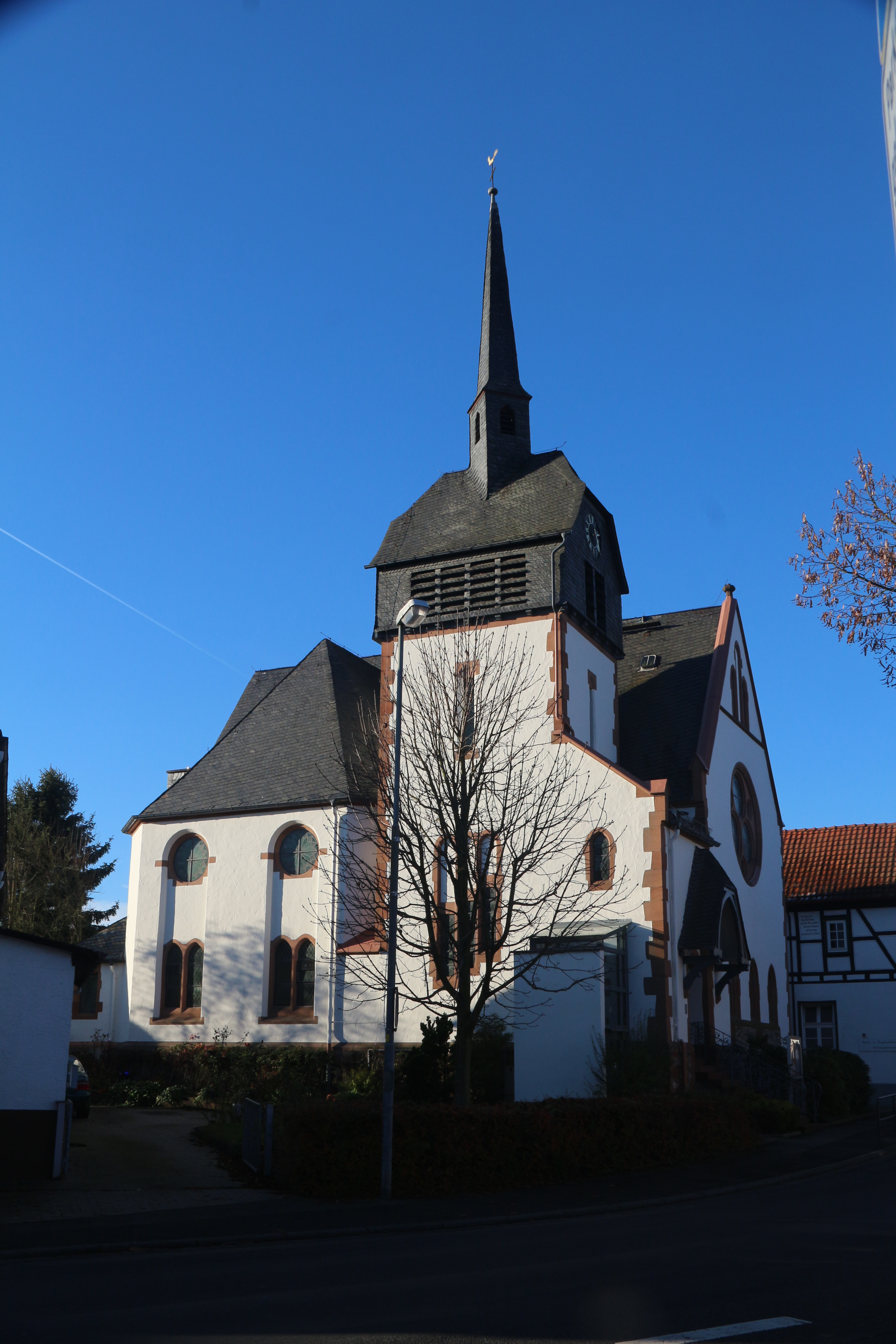 Fellingshausen